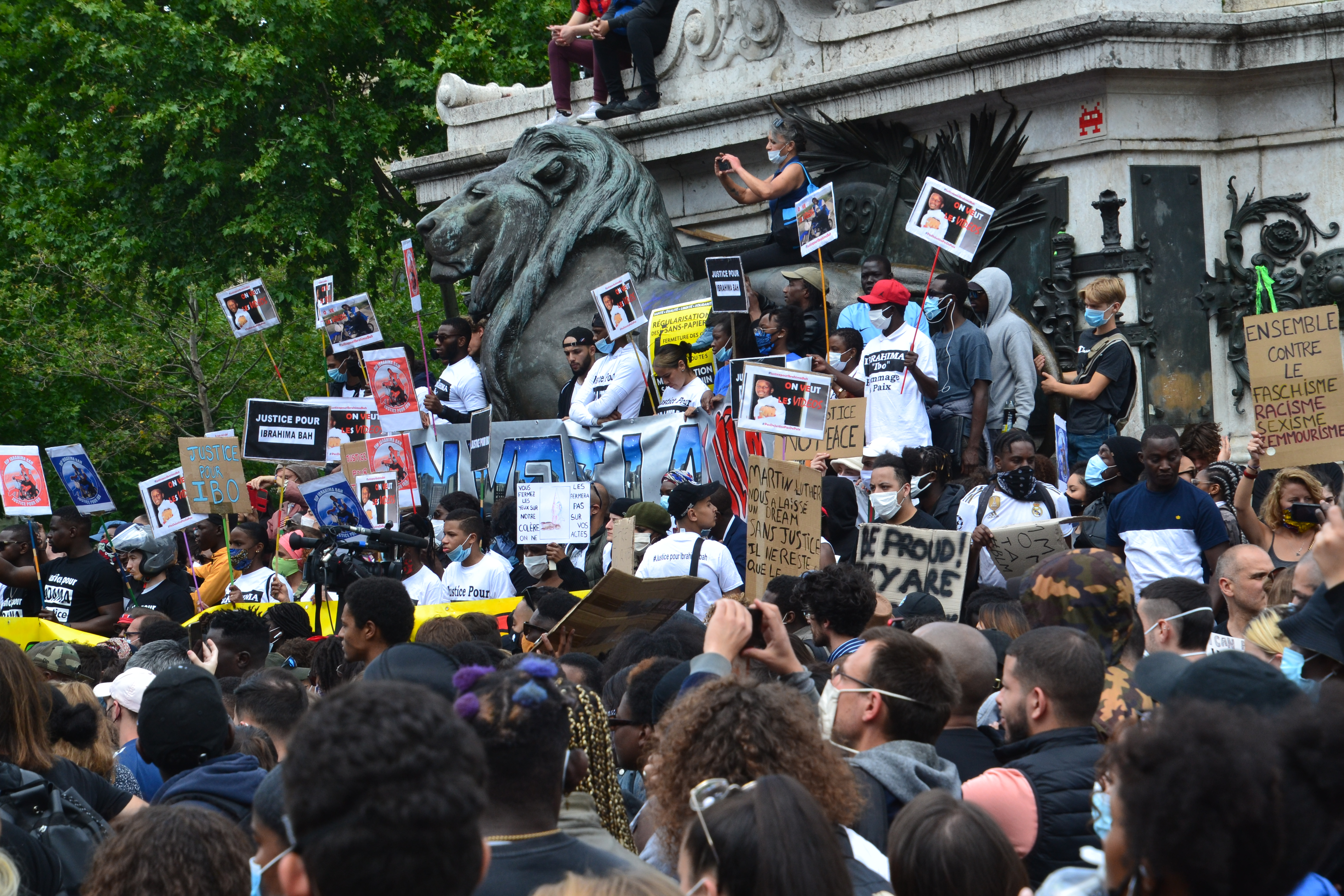 Comme dans d'autres villes de France (Lyon, Marseille, Montpellier…), manifestation contre le racisme et les violences policières. A Paris, rassemblement à l’appel du Comité Adama, du nom d’Adama Traoré, mort en juillet 2016 après son interpellation par la gendarmerie en banlieue parisienne. La manifestation à Paris place de la République a été bloqué par la police, les manifestants sont donc restés place de la République toute l'après-midi.